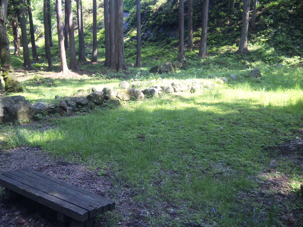 七尾城調度丸